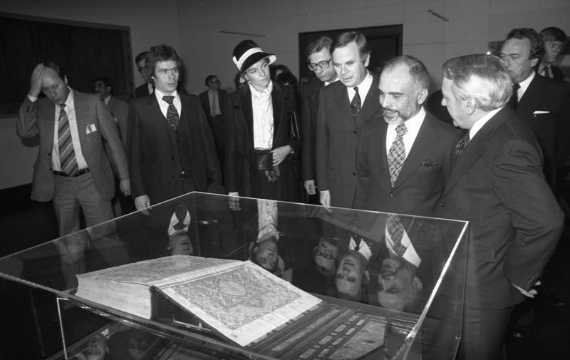 Staatsbesuch König Hussein II. und Königin Nur-Hussein in der Bundesrepublick Deutschland Besichtigung des Museums für Islamische Kunst.